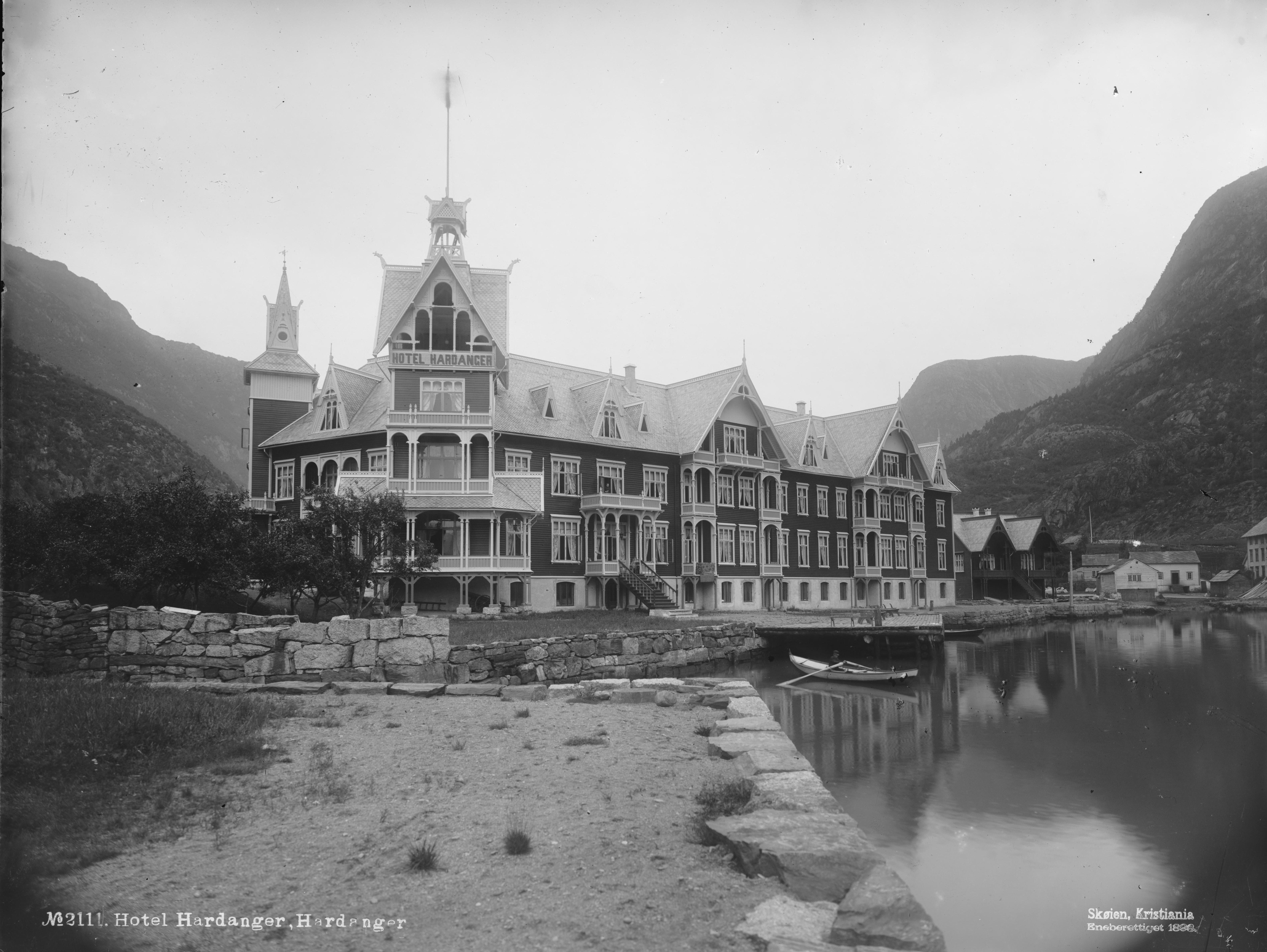 Påskrift negativ: No 2111. Hotel Hardanger, Skøien, Kristiania Eneberettiget 1898 Påskrift negativ: 276 Odda. Hardanger Hotel [Riksantikvaren] Påskrift konvolutt: B-276 Odda. Hotel Hardanger II sett fra sjøsiden [Riksantikvaren]. Arkitekt: Hans Heinrich Jess [Negativet er eksponert med speilvendt resultat. Rettet opp.] Sted: Odda Kommune: Odda Fylke: Hordaland Tagger: hotell Hotel Hardanger fasade